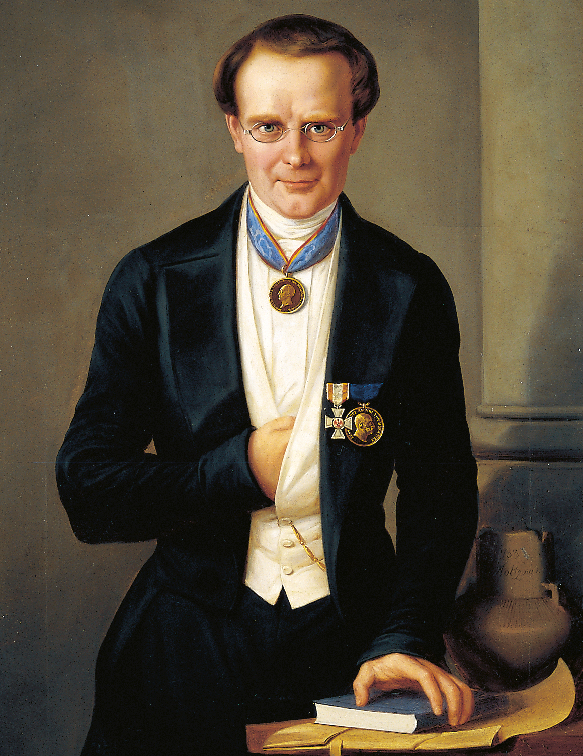 Porträt von Georg Christian Friedrich Lisch (1801-1883); er trägt die Medaille für Kunst und Wissenschaft (Mecklenburg-Schwerin), den Roten Adlerorden und die kaiserlich russische Goldene Medaille Nikolaus I. PRAEMIA DIGNO